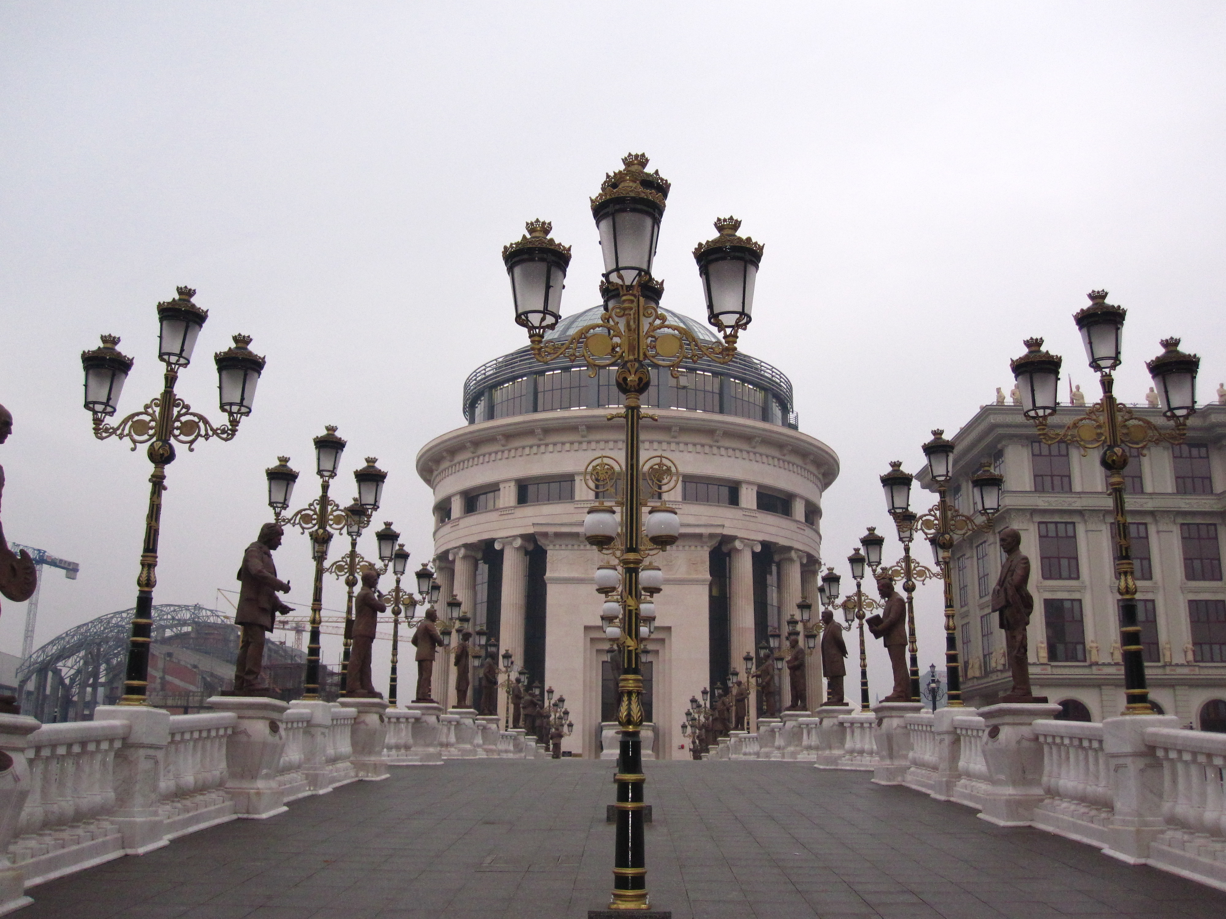 Мост на уметноста Скопје.